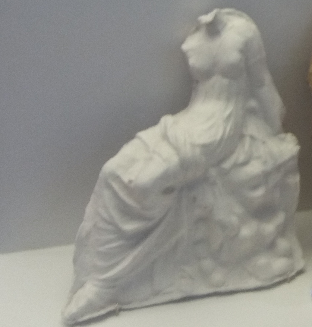 девушка на скале, Херсонес Таврический, античный зал музея.